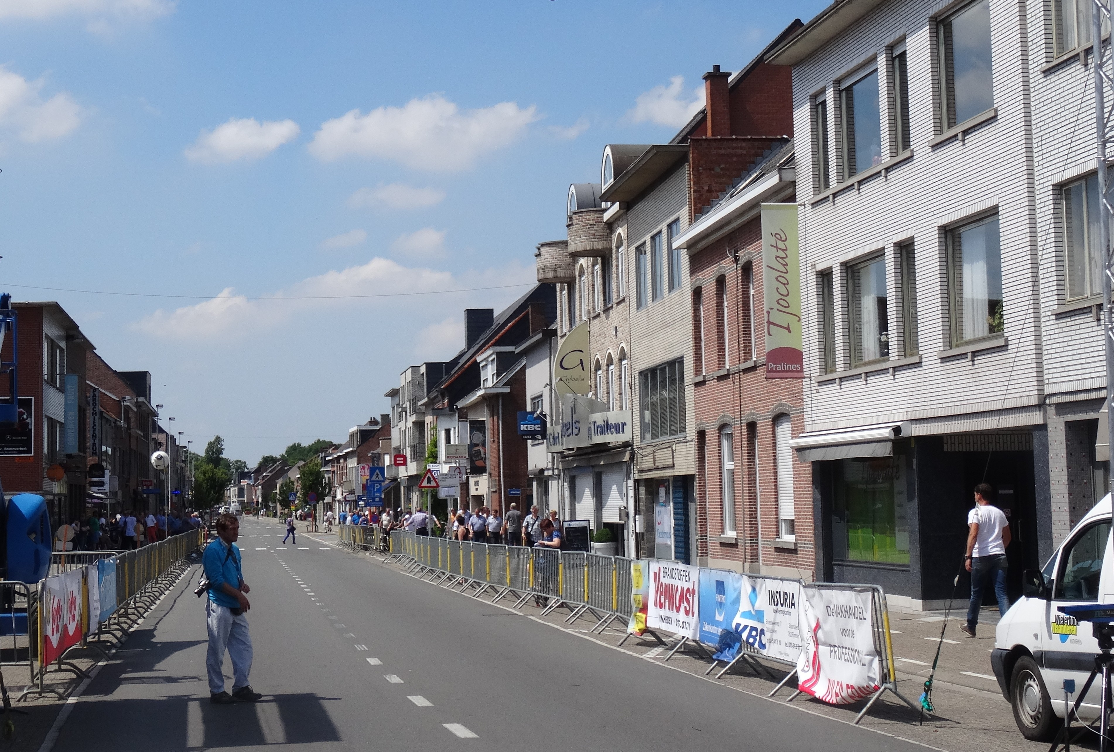 Reportage réalisé le dimanche 8 juin à l'occasion de l'arrivée du Mémorial Philippe Van Coningsloo 2014 à Bonheiden, Belgique.